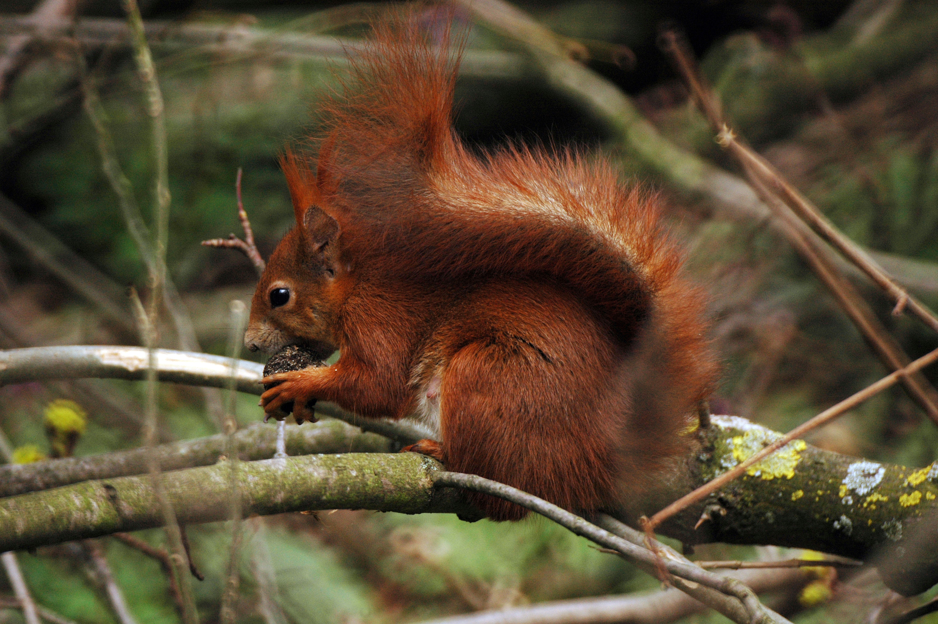 ein Eichhörnchen frisst eine Eichel